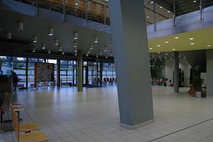 Wydział Technologi Żywnośći Ar w Krakowie